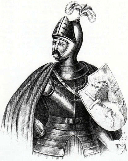 Magnus Torquatus, Herzog von Braunschweig-Lüneburg, Malerei in der Schriftenreihe "Braunschweiger Fürstensaal" von 1840